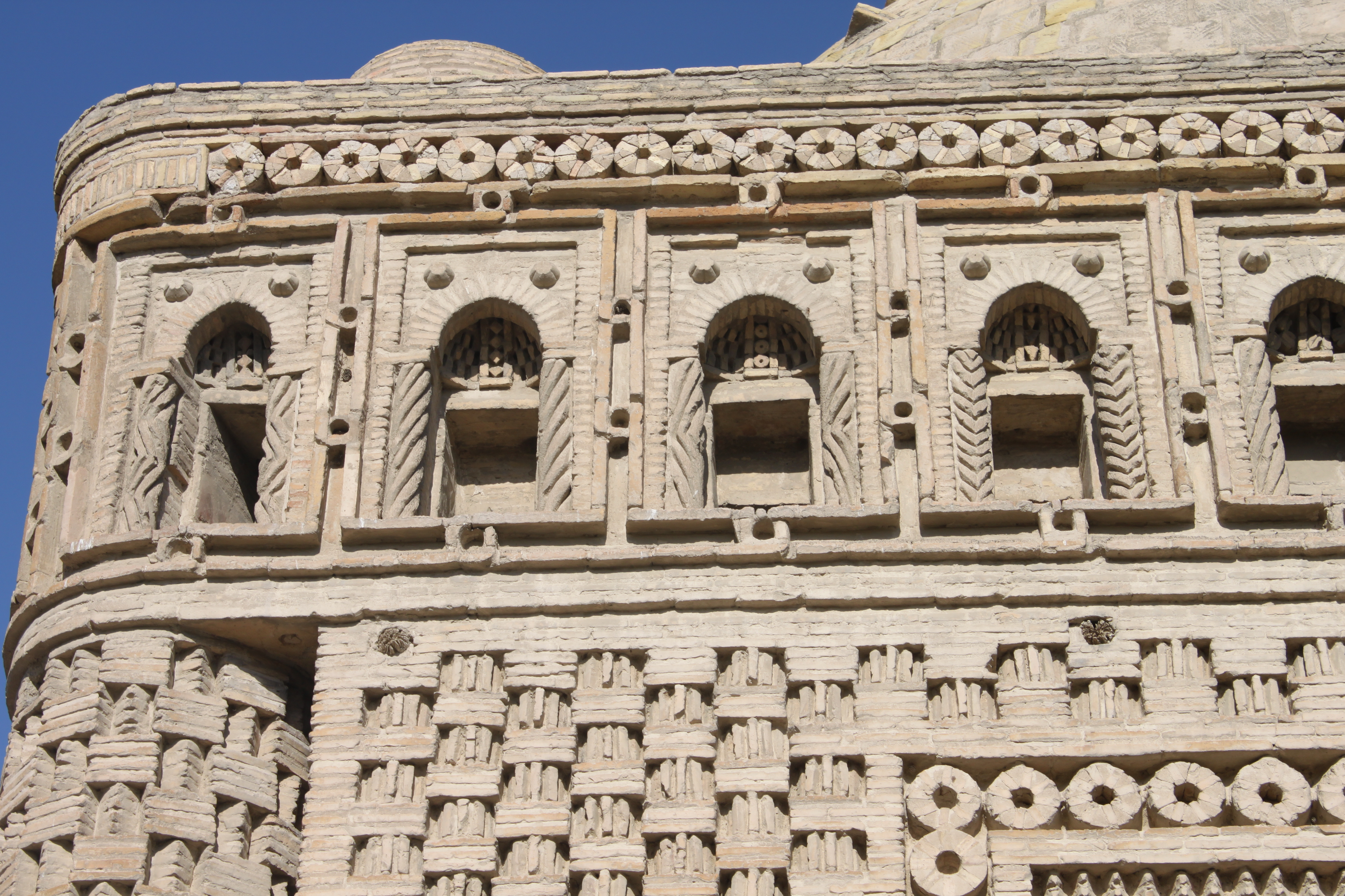 Détail extérieur du mausolée samanide à Boukhara